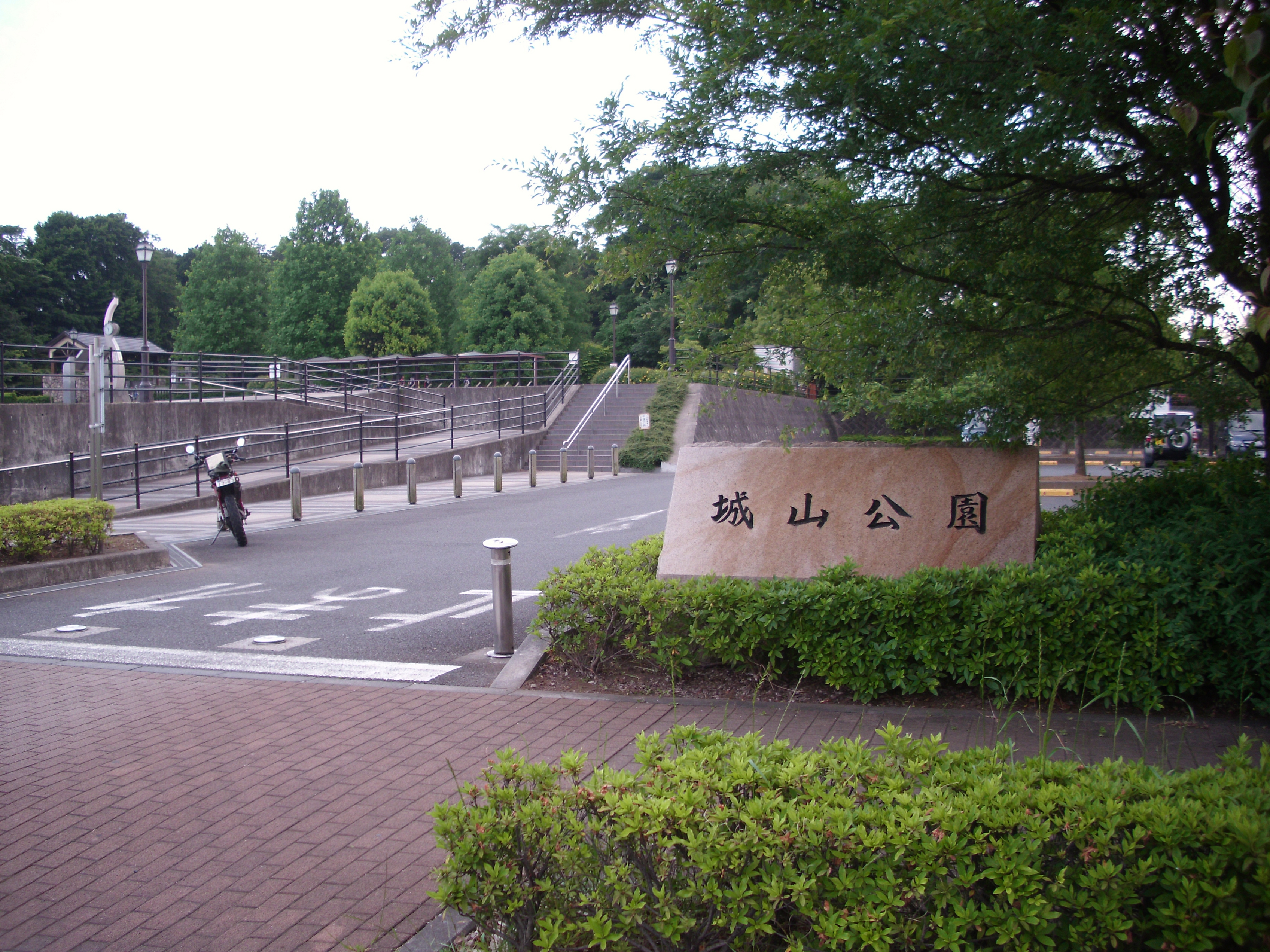 綾瀬市 城山公園